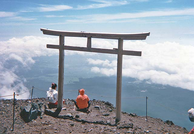 Torii near summit of Mt. Fuji, Honshu, Japan volcano volcanic cone.